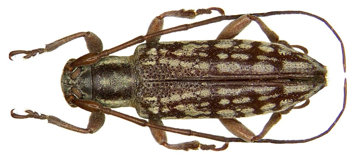 Familie: Cerambycidae Groesse: 8,5 mm Fundort: Indonesien, Sulawesi, Macasar Type, Museum London Photo: U.Schmidt, 2007